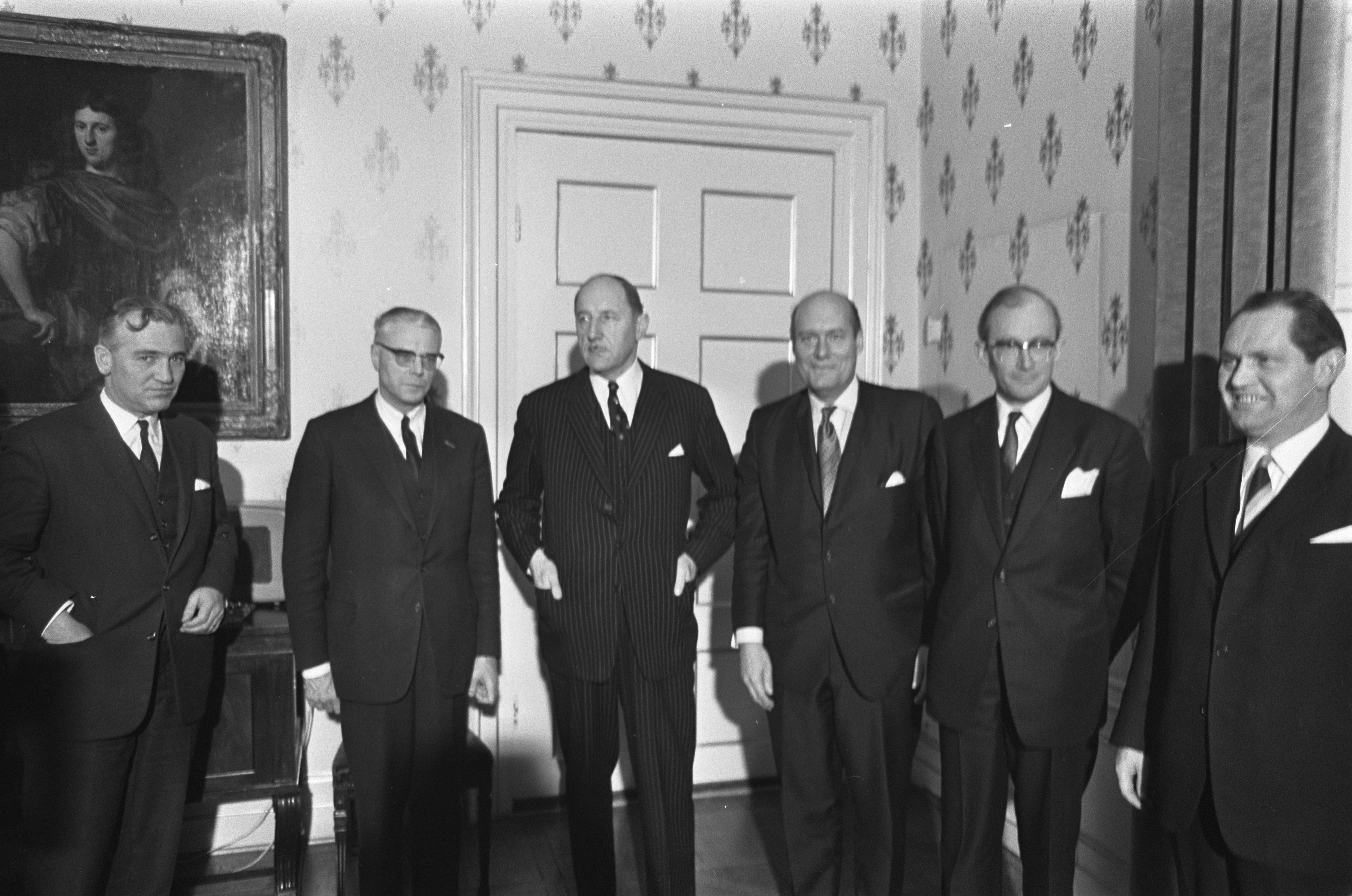 Collectie / Archief : Fotocollectie Anefo Reportage / Serie : [ onbekend ] Beschrijving : Amerikaanse Staatssecretaris van Buitenlandse Zaken Katzenbach in Den Haag . Zijlstra, Luns, Katzenbach en Witteveen Datum : 4 januari 1968 Locatie : Den Haag, Zuid-Holland Persoonsnaam : Katzenbach, Luns, J.A.M.H., Luns, Joseph, Staatssecretaris van Buitenlandse Zaken Zijlstra Fotograaf : Nijs, Jac. de / Anefo Auteursrechthebbende : Nationaal Archief Materiaalsoort : Negatief (zwart/wit) Nummer archiefinventaris : bekijk toegang 2.24.01.05 Bestanddeelnummer : 920-9664